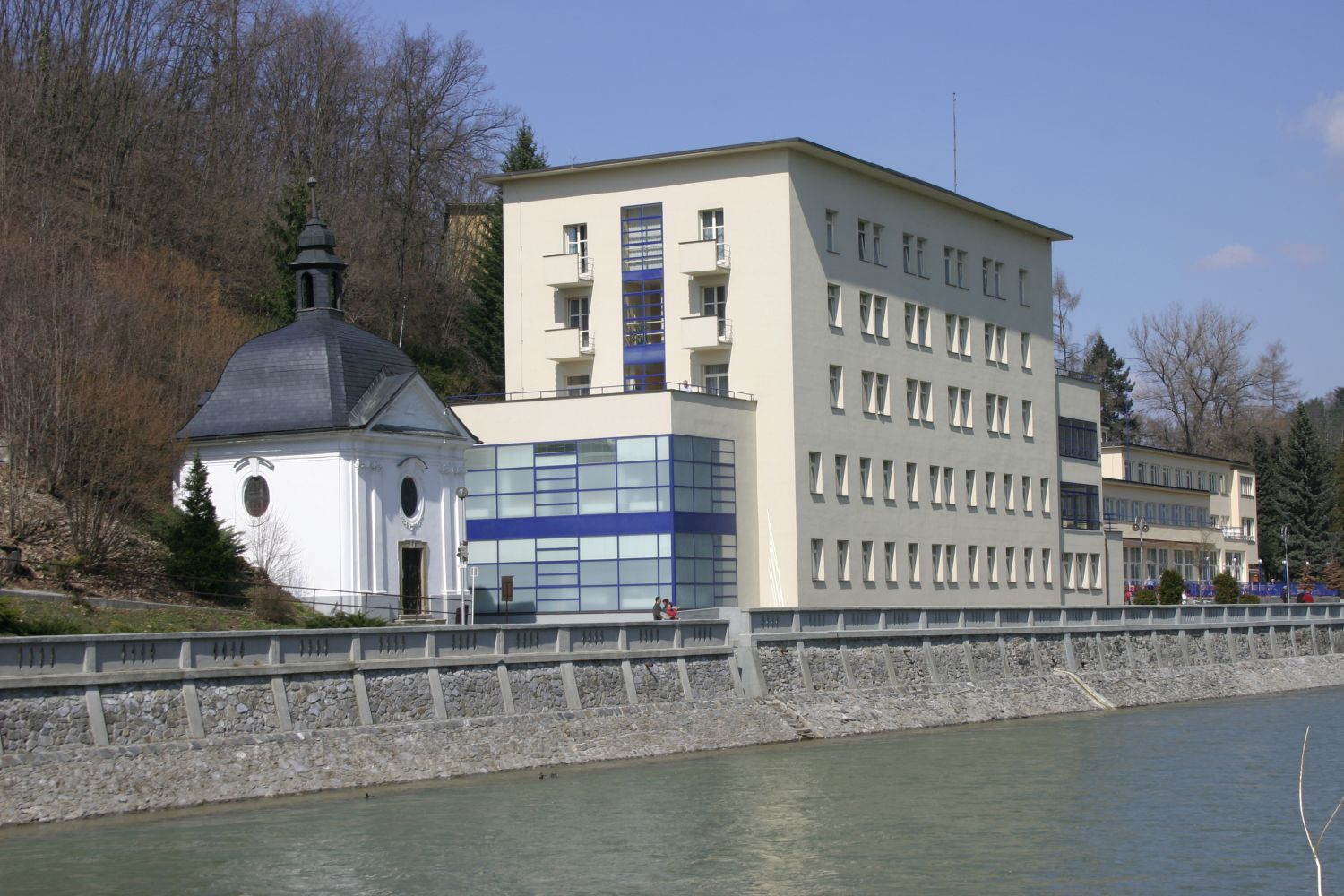 Teplice nad Bečvou, spa building with hotel and restaurant Bečva - Teplice nad Bečvou, lázeňská budova s hotelem a restaurací Bečva